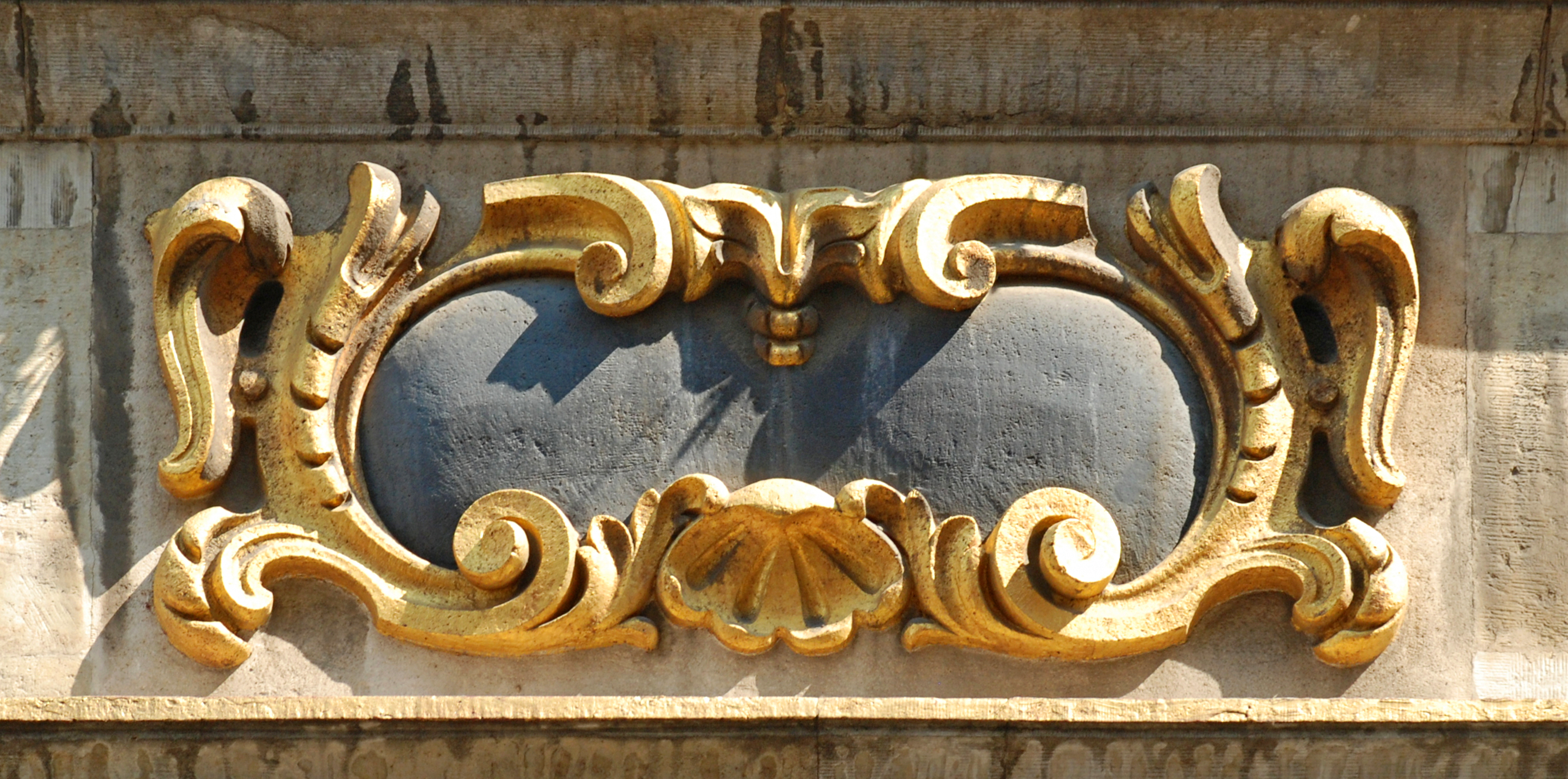 Belgique - Bruxelles - Grand-Place - Maison du Roi de Bavière (Grand-Place n° 12A)